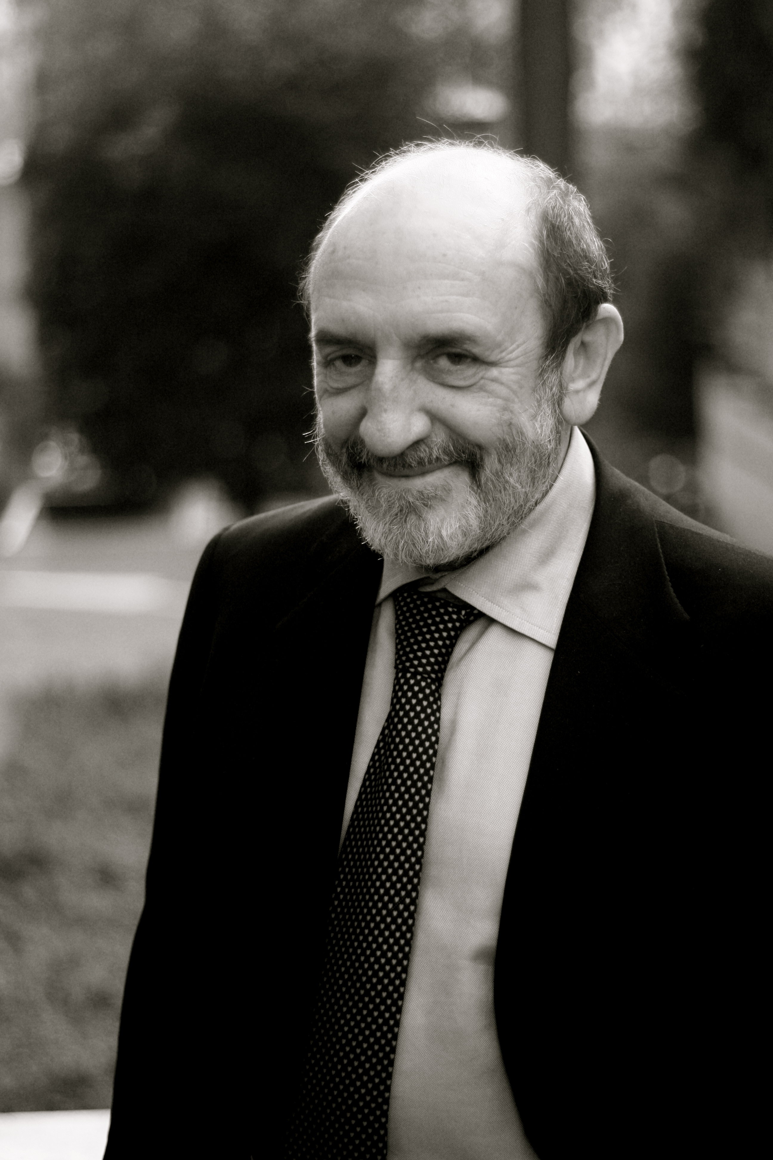 Valerio Aiuti